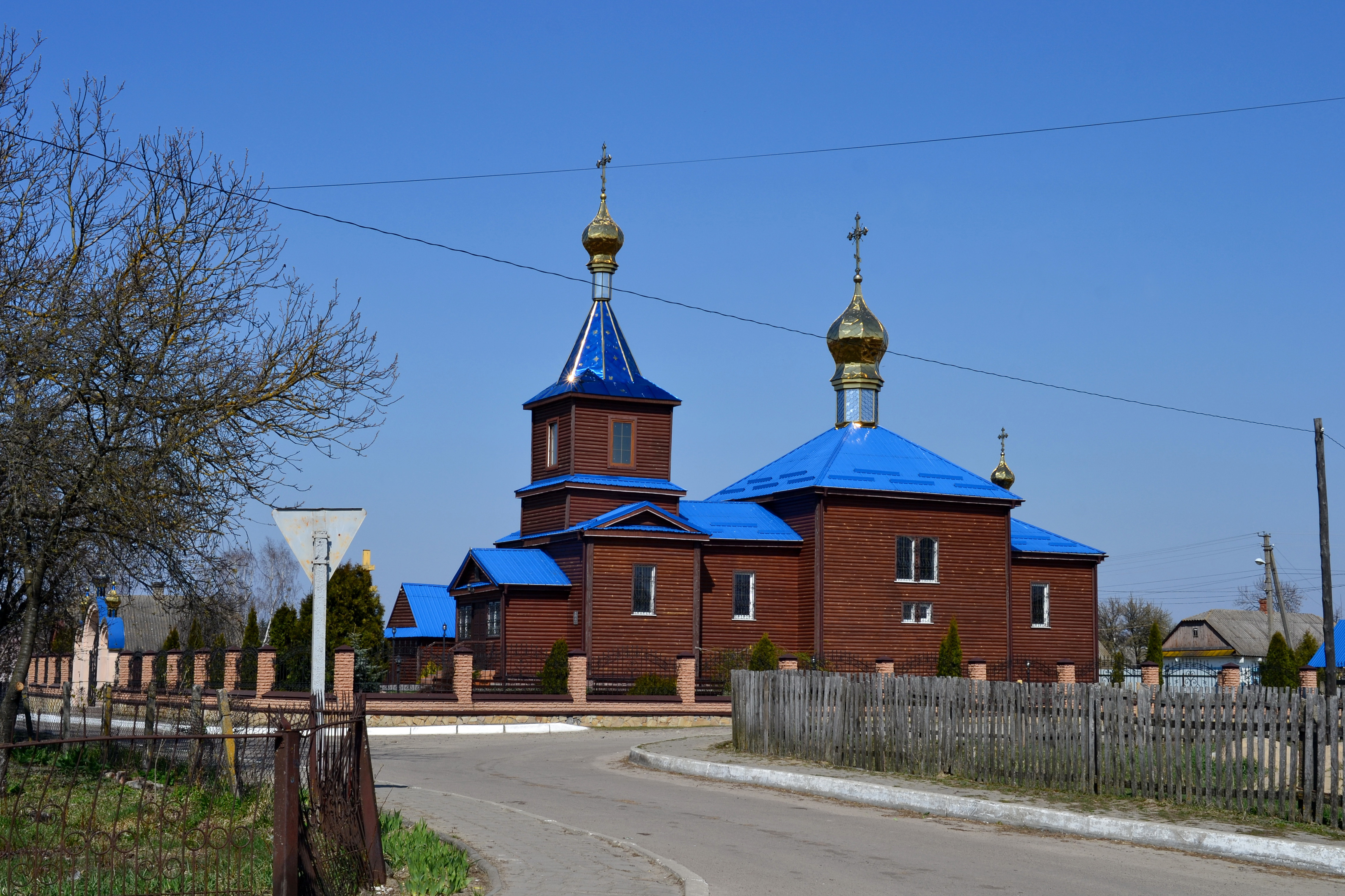 Церква Іоанна Богослова (дер.) (1878 рік) - вигляд з південного заходу - Скулин (в центрі села) Ковельський район Волинська область Україна